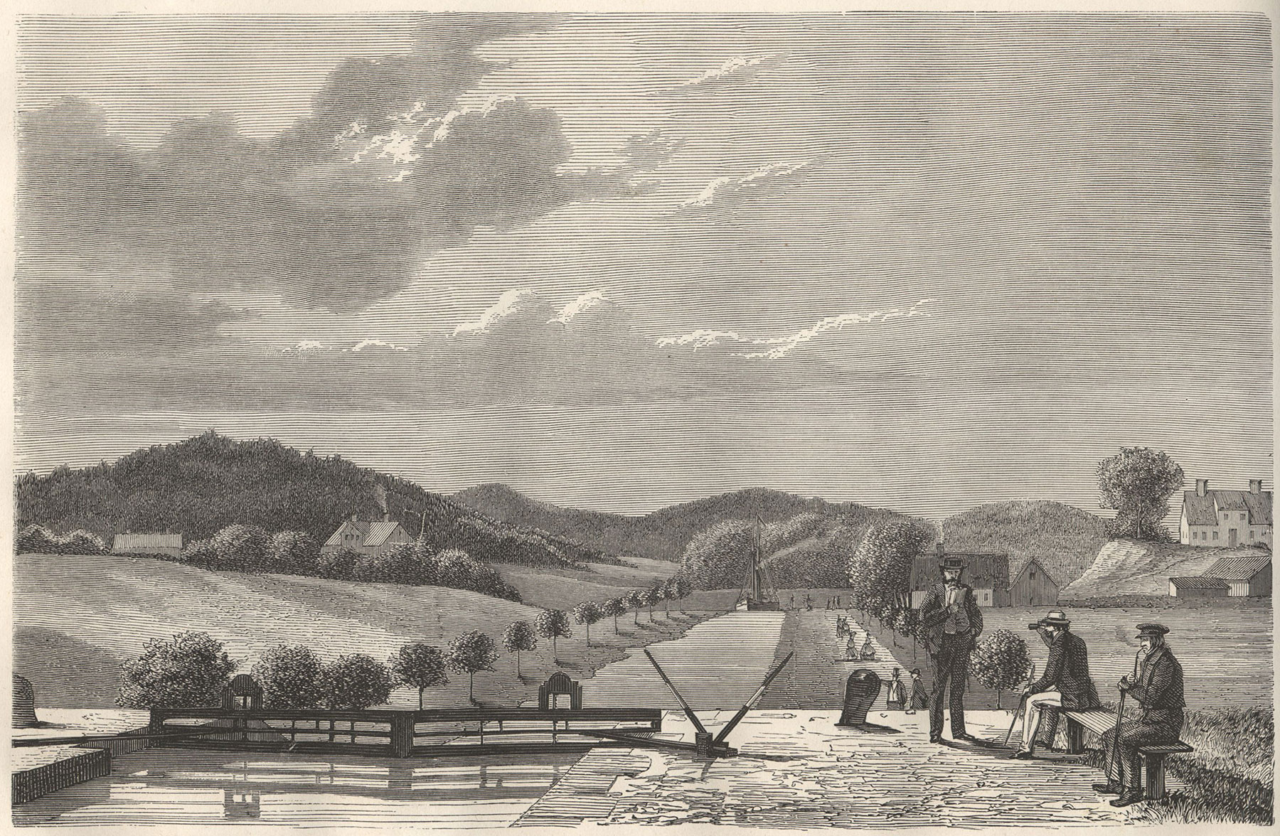 Göta kanal. Carlsborg. Övre slussen. Söderköpings kommun